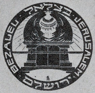 כרטיס של תלמיד בצלאל שמואל פרסוב. 1906. אוסף מוזיאון ישראל, מתנת תמר תמיר, ערד.